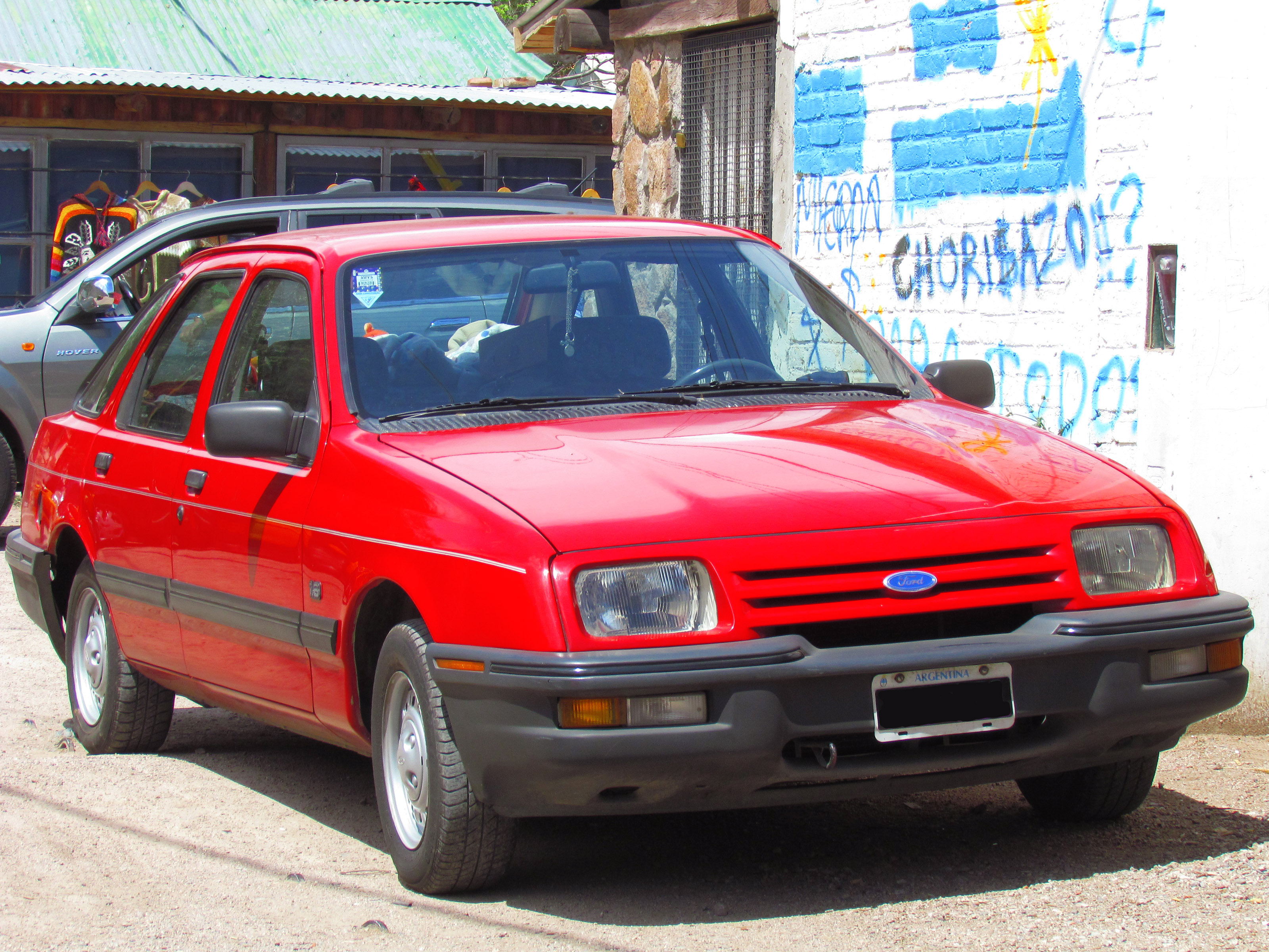 Ford Sierra 1.6 GL Liftback